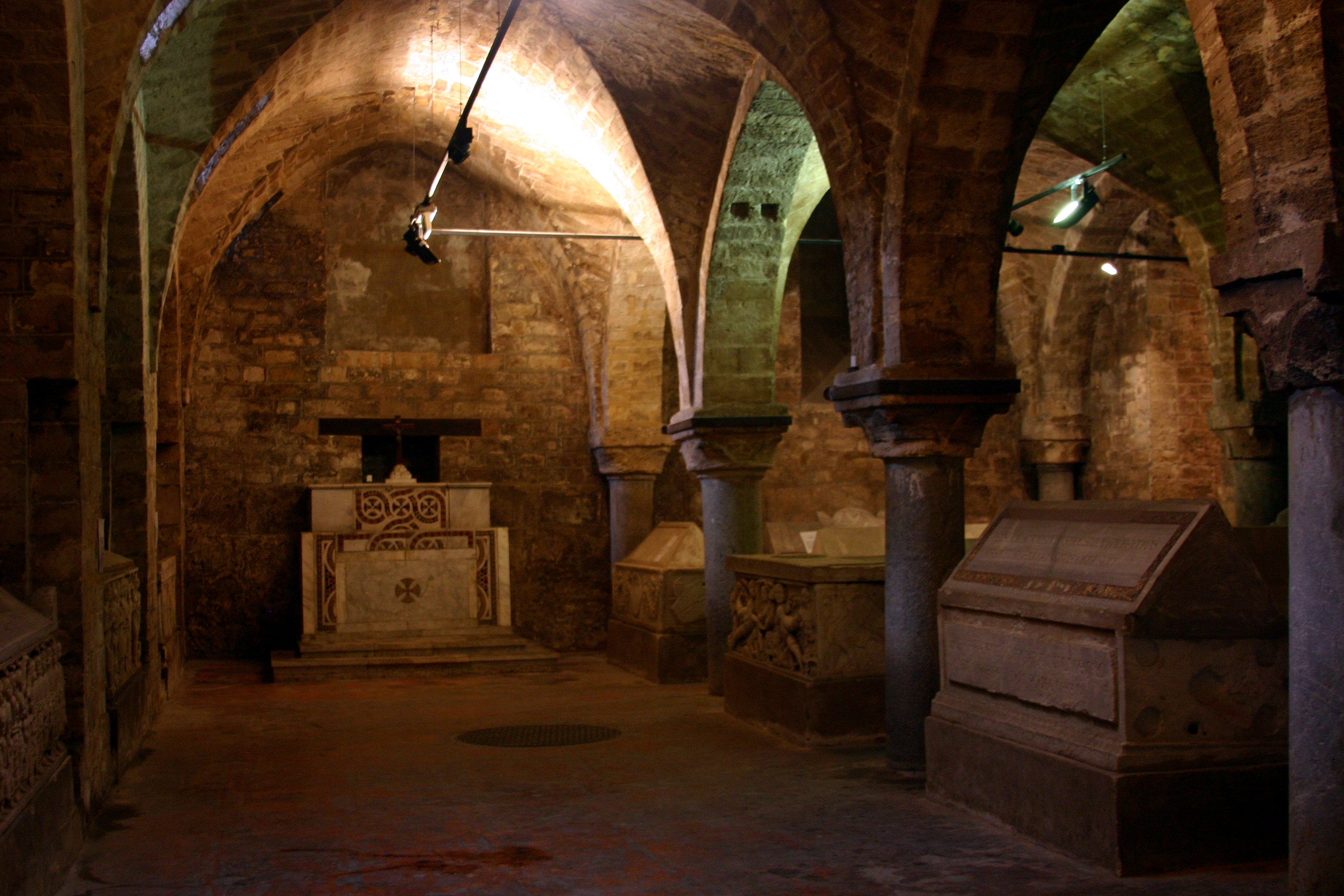 Crypt - Cathedral of Palermo